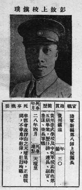 中文（台灣）: 抗戰軍人忠烈錄第一輯中的烈士遺像